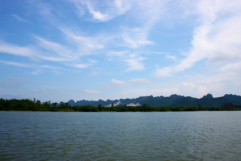 Hồ Yên Thắng ở Yên Mô-thành phố Tam Điệp, Ninh Bình